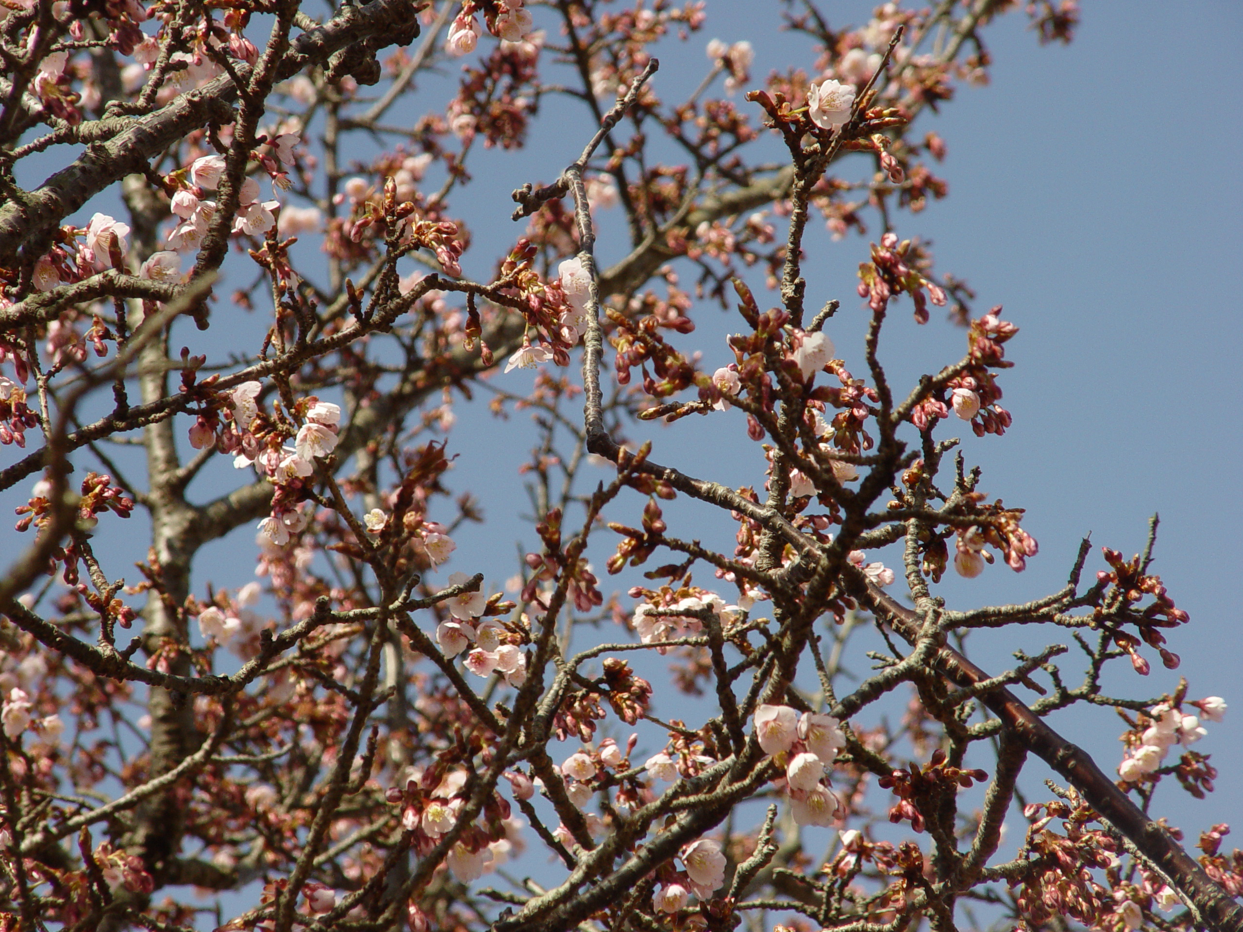 Prunus (Kawazu-zakura), at Sakura-no-sato in Shizuoka pref. 河津桜、静岡県さくらの里にて